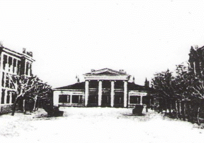 Будинок Рада народних комісарів ДКР у місті Луганськ 1918